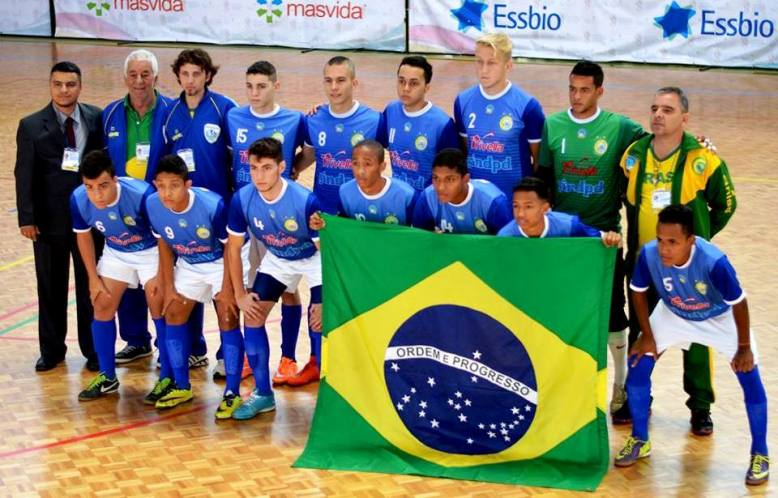 Foto da Seleção Brasileira de Futebol de Salão no Mundial C-20 de 2014